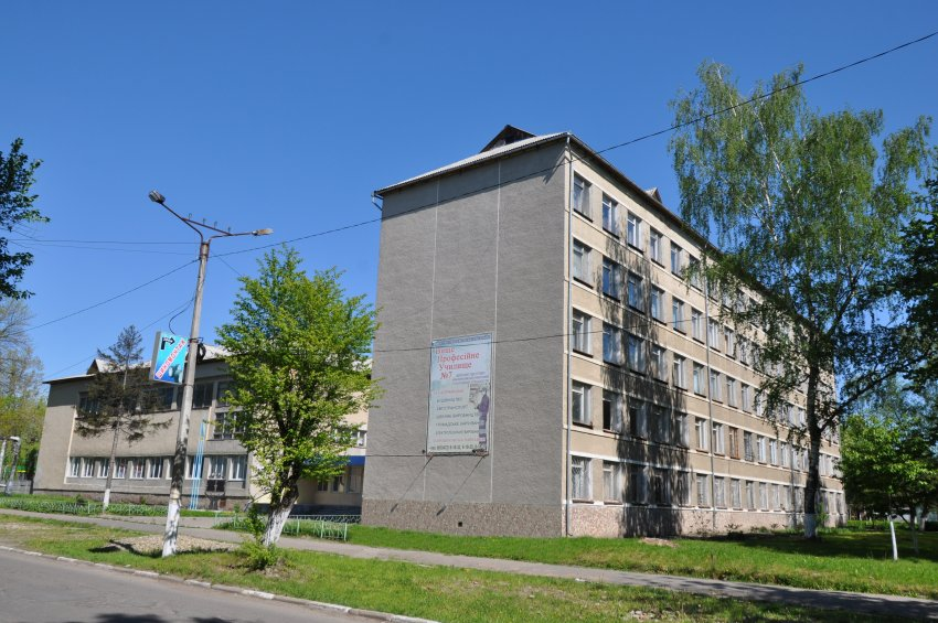 ВПУ № 7